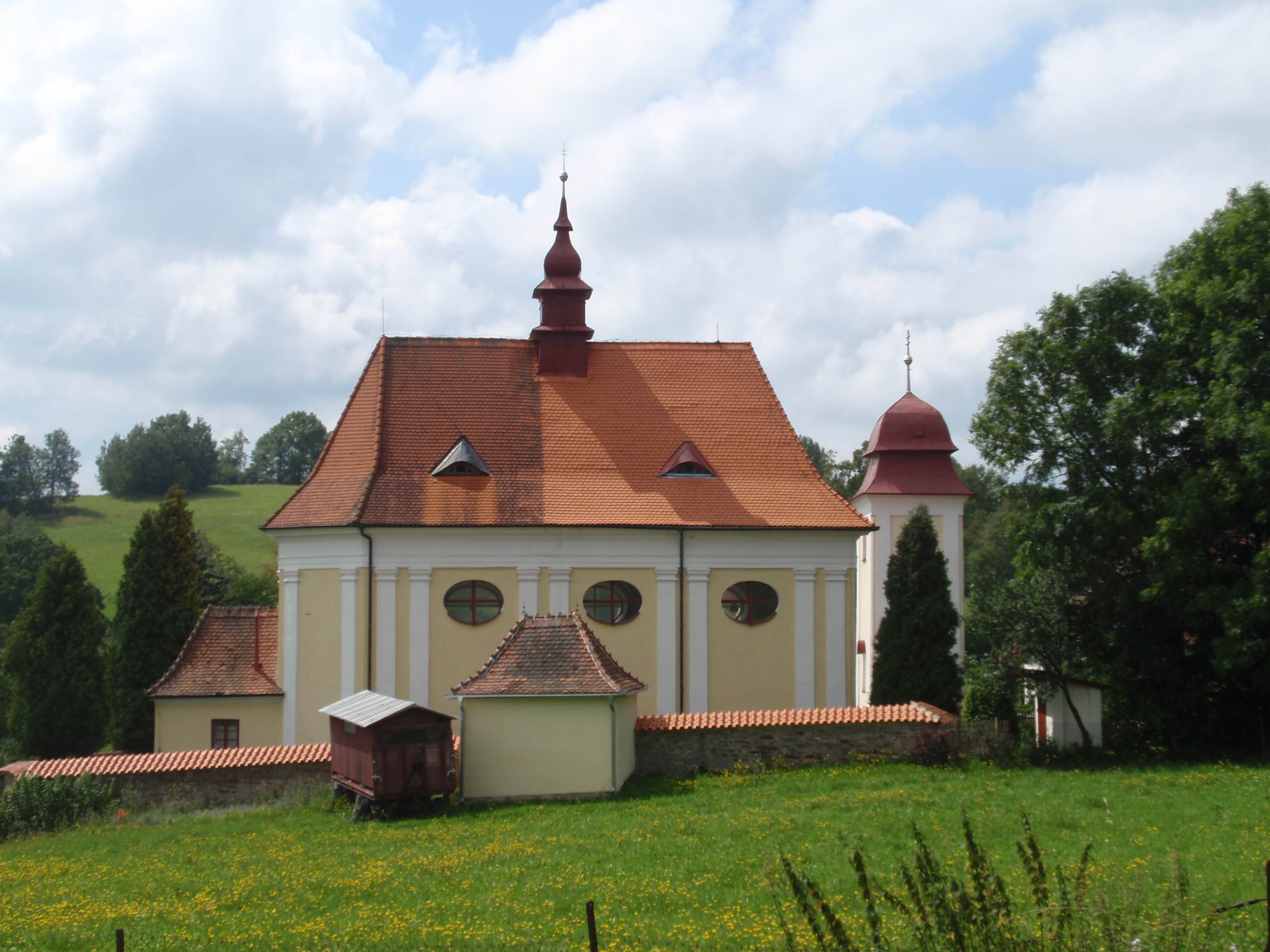 Kostel sv. Markéty (Prosetín), Prosetín